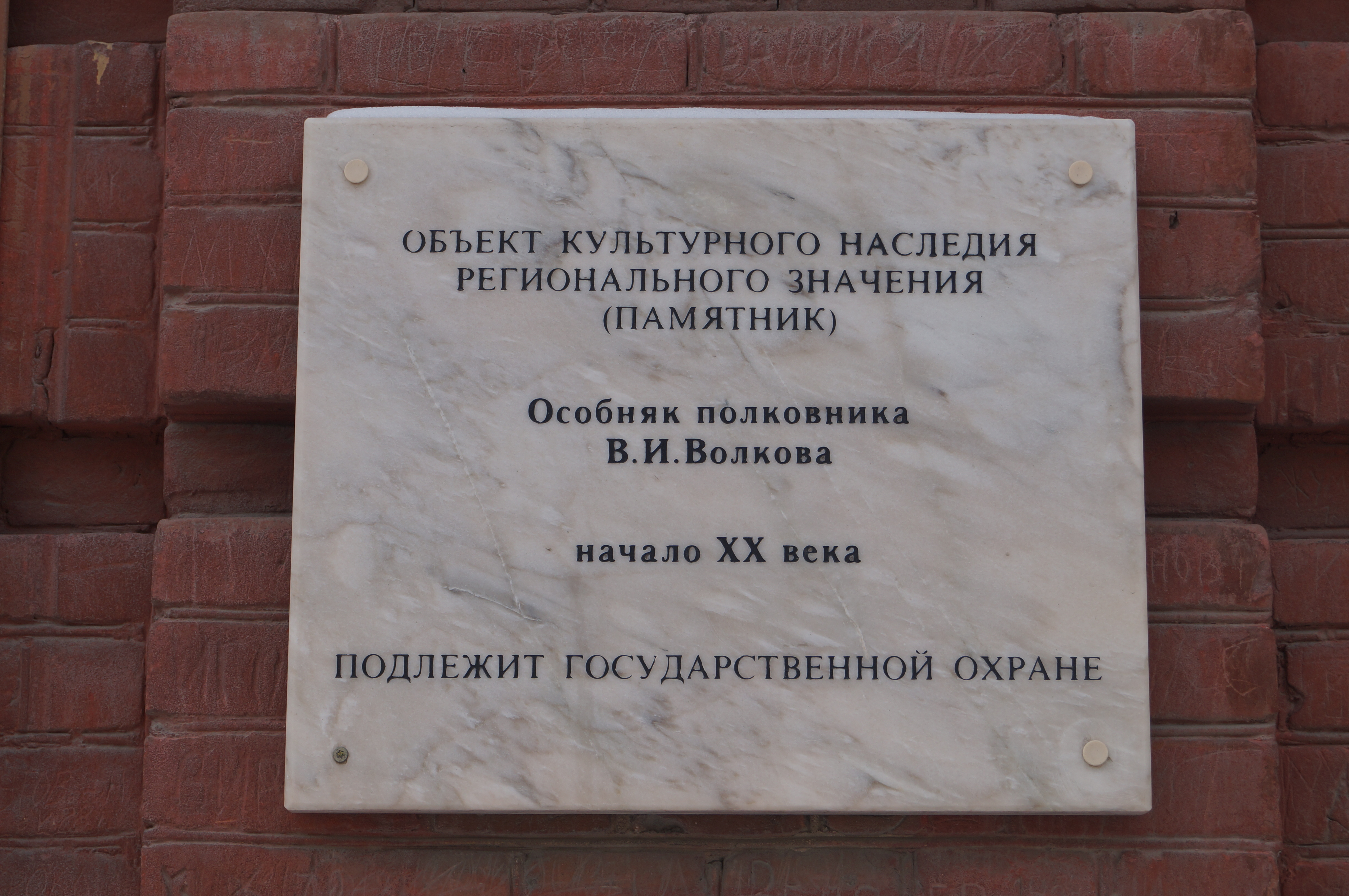 Мемориальная доска на особняке В.И. Волкова